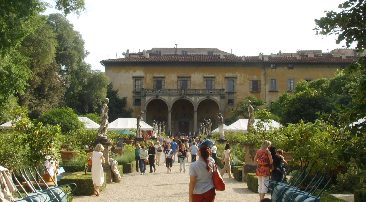 Casino corsini al prato